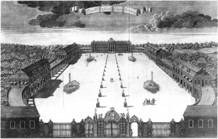 Das Hochfürstl. Schloß Dornburg, Kupferstich, 1757. Anmerkung:Auf Friedrich Joachim Stengel (1694-1787)geht nach aktuellem Forschungsstand allein das Corps de logis zurück. Alle anderen Bauten der Schlossanlage sind Phantasie des Kupferstechers Johann Christian Püschel. Das dargestellte Bild des Schlossanlage ist nicht durch originale Entwurfszeichnungen des Architekten oder archäologische Funde alter Bausubstanz nachgewiesen. In Lentz 1757, nach Seite 950 ist durch Signatur belegt, dass auch die Vorzeichnung zum Kupferstich von Johann Christian Püschel gefertigt wurde. Dies läßt vermuten, dass der Kupferstich keinen Schau-Riß von der Hand Stengels wiedergibt. Ob Püschel evtl. Einzelentwürfe der von Stengel geplanten Schlossgebäude zu einer Gesamtperspektive zusammenfügte ist nicht nachgewiesen.